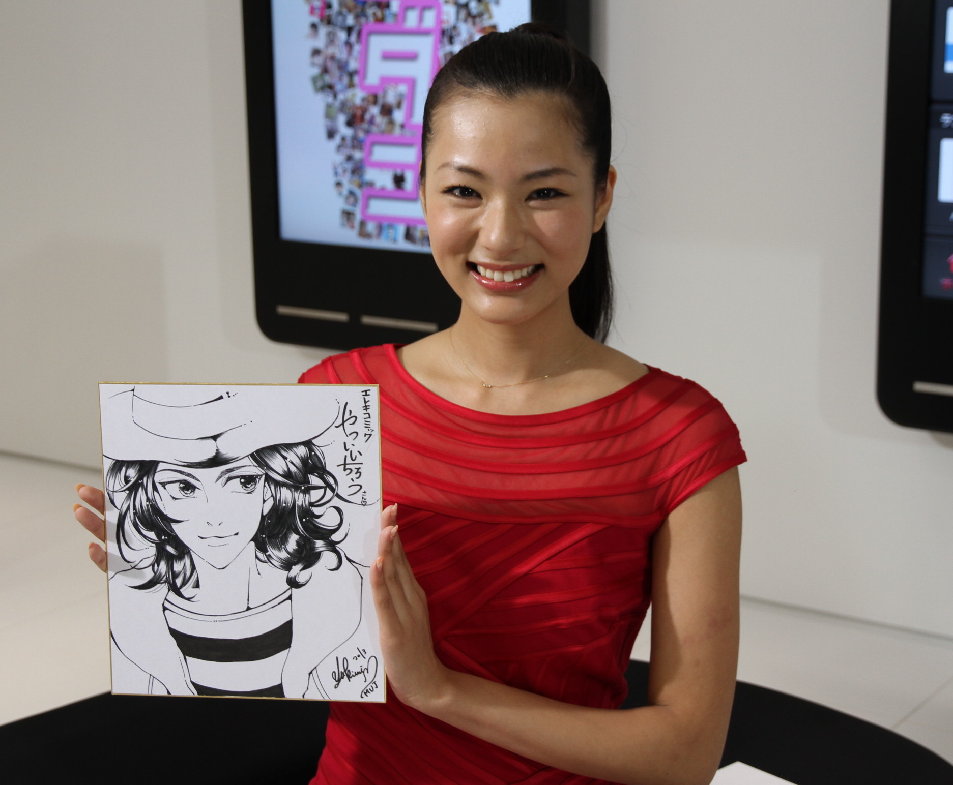 エンダン 松尾幸実